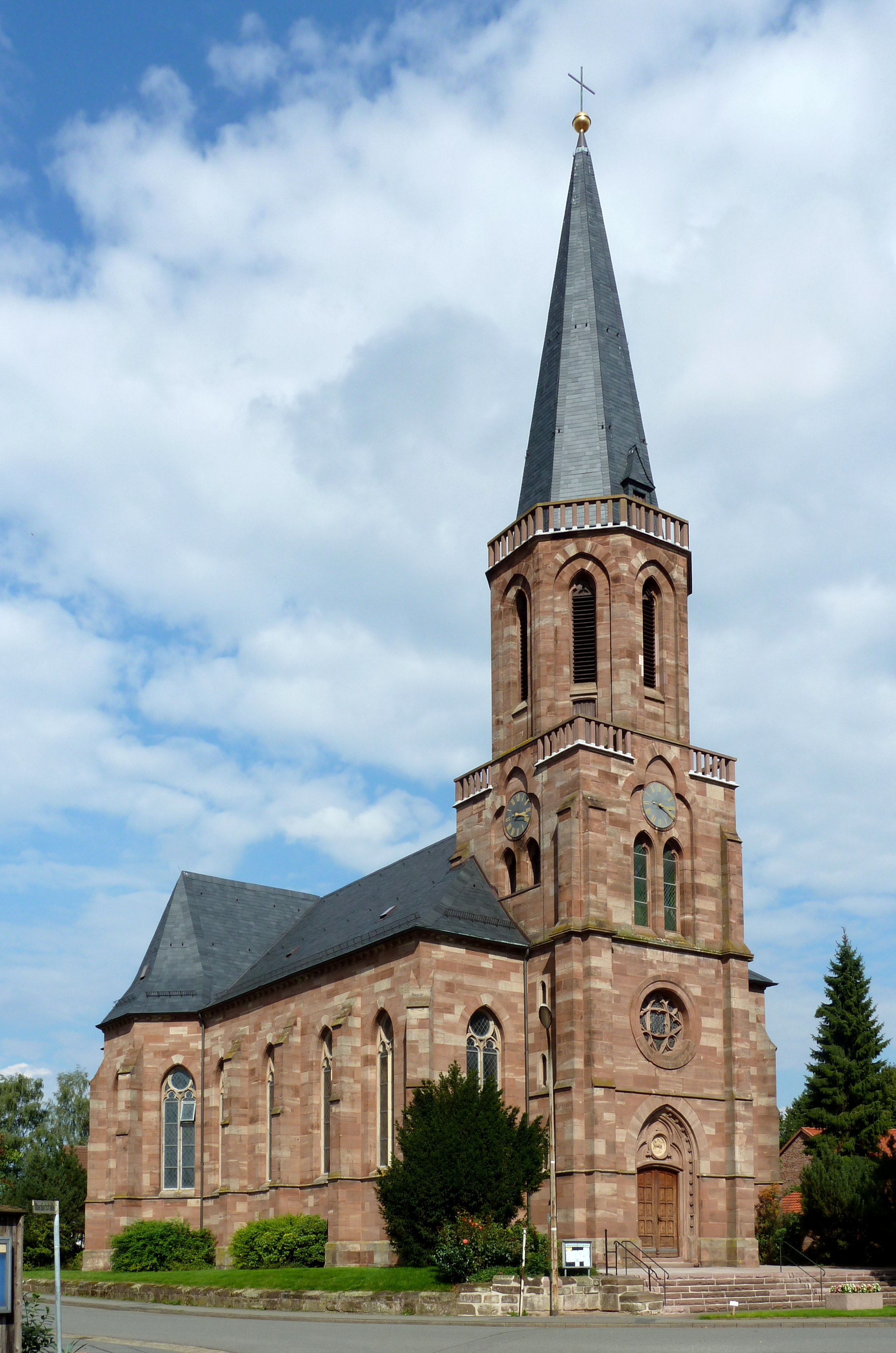 Neugotische, römisch-katholische Kirche St. Peter und Paul in Bernshausen, Gemeinde Seeburg im Untereichsfeld. Erbaut 1874–76 durch Diözesanbaumeister V. Statz